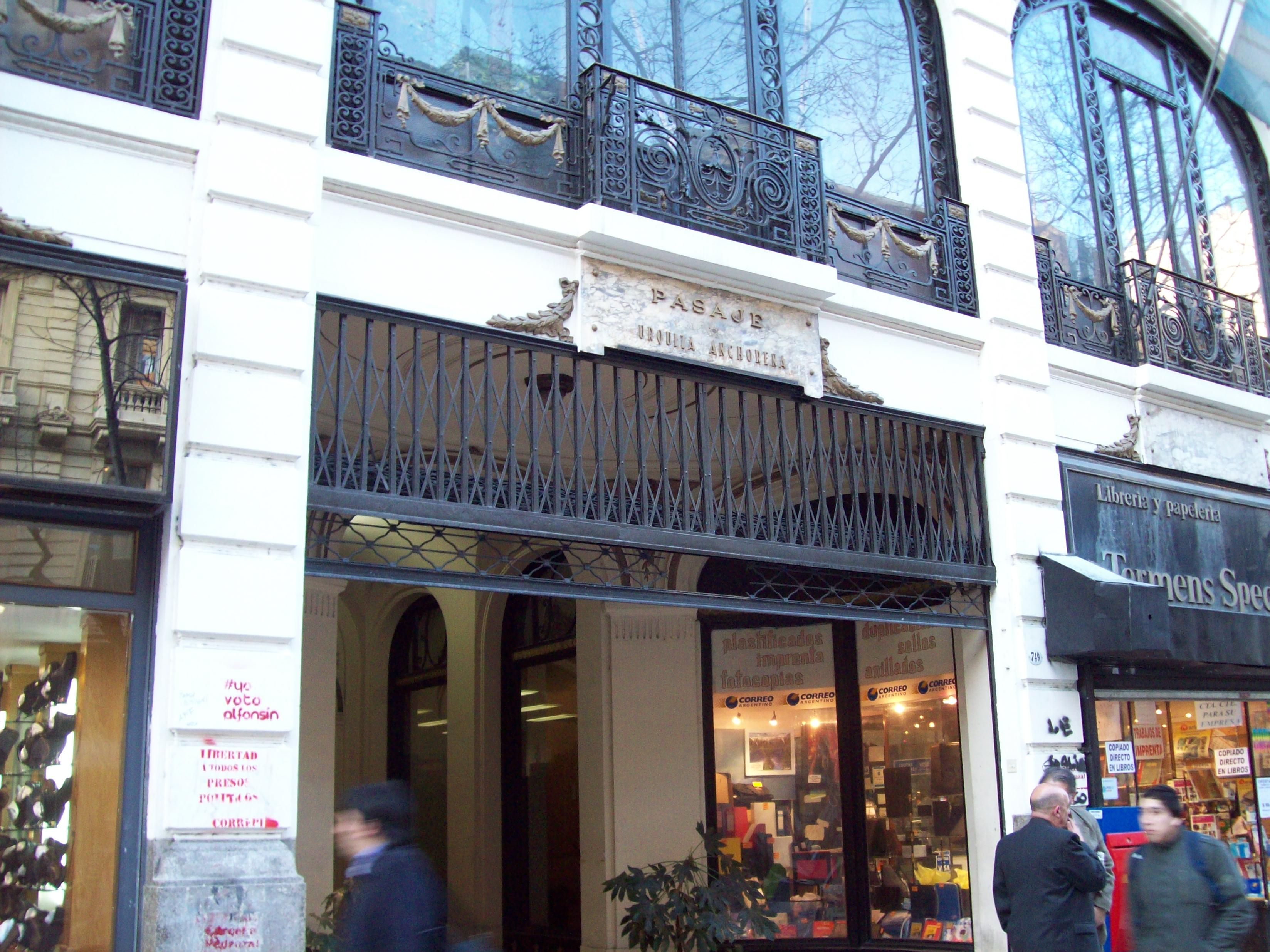 Pasaje Urquiza Anchorena, Buenos Aires.